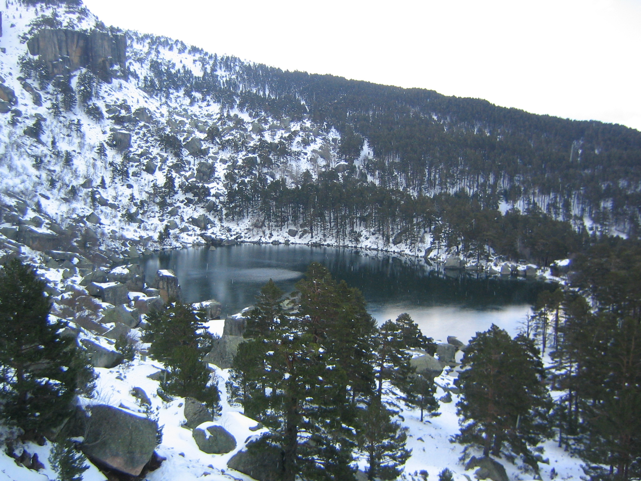 Laguna Negra de Urbión en Vinuesa, Soria (Castilla León) (España).